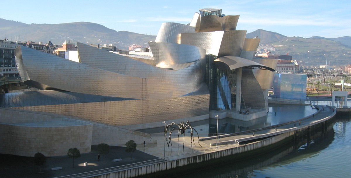 Guggenheim Museum Bilbao. Maman by Louise Bourgeois